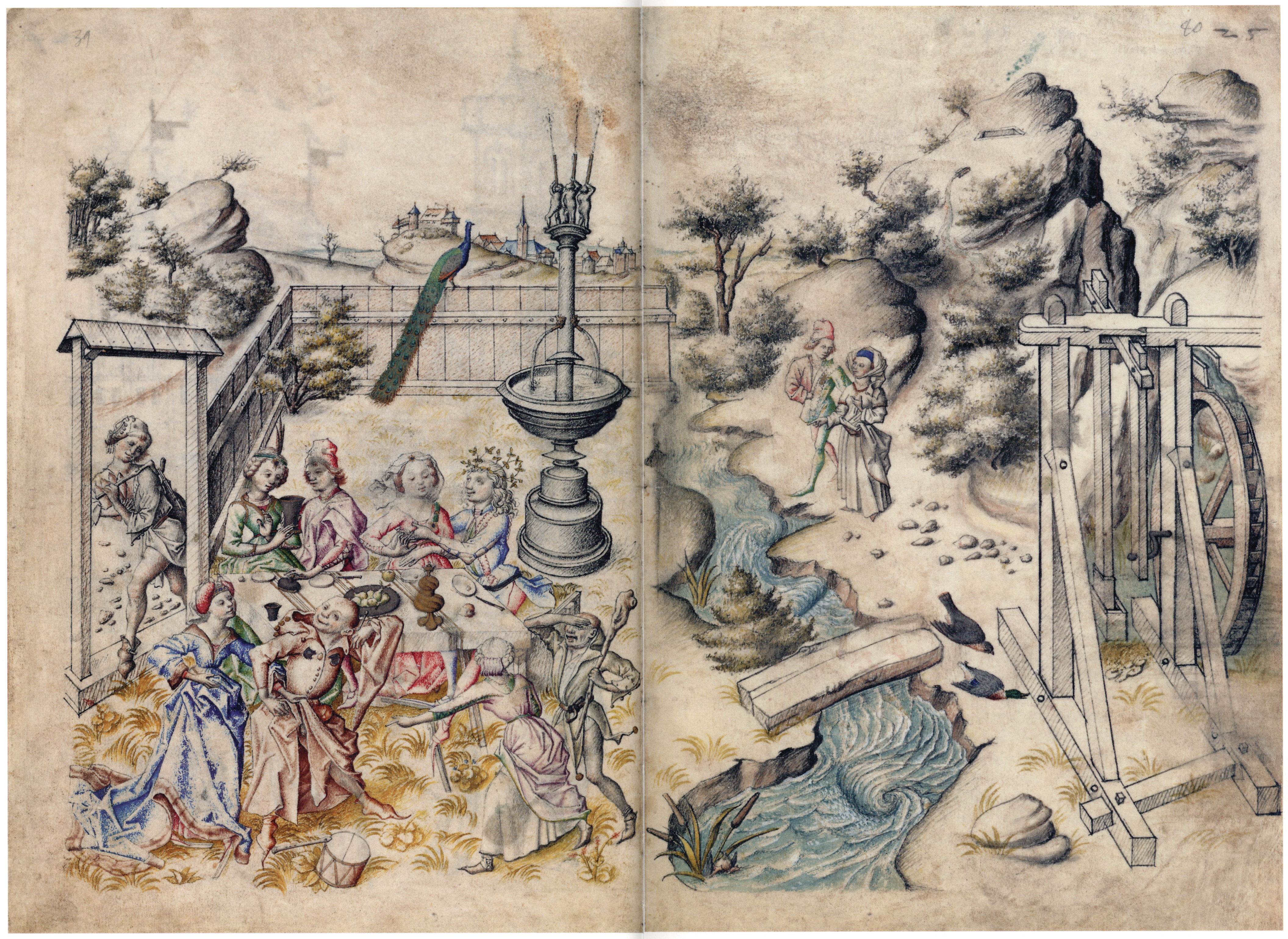 Mittelalterliches Hausbuch von Schloss Wolfegg Doppelseite fol. 24v–25r (Der obszöne Liebesgarten) teilweise nach dem Vorbild von Meister E. S.: "Der große Liebesgarten"